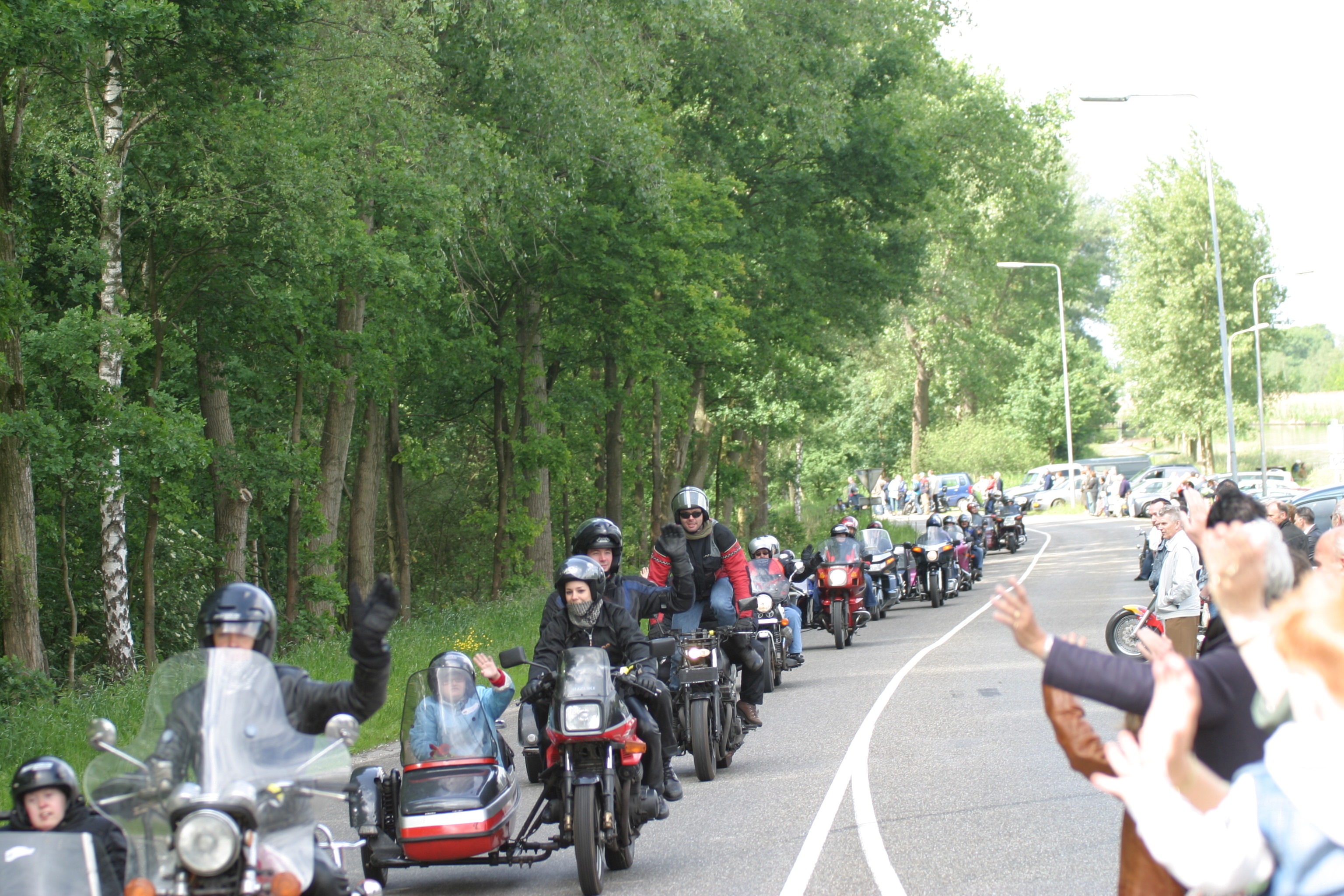 Zijspanrijders tijdens een toerrit met gehandicapten Toestemming van Weertfm